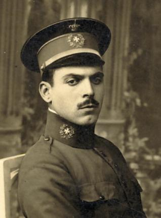 Salustiano Mas Cleries (1892-1955).